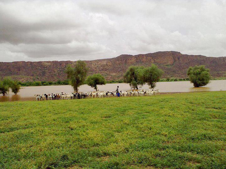 مراعي